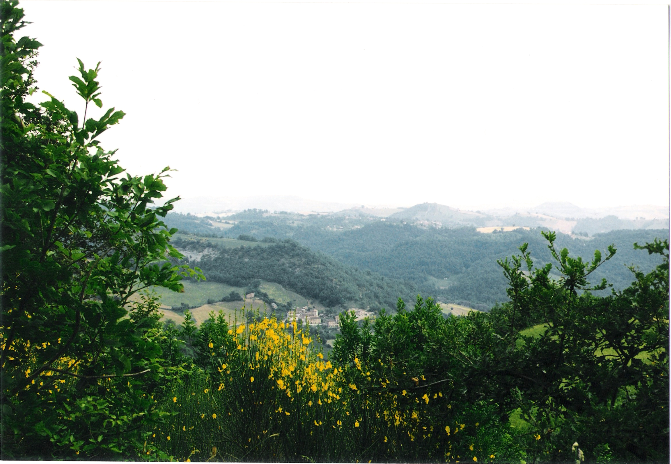 Vista panoramica verso Paterno, Amandola (FM)